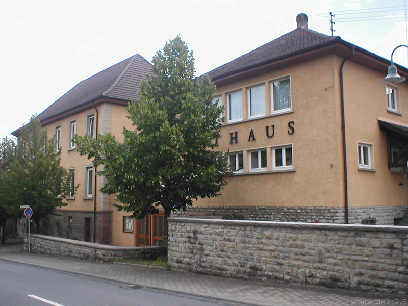 Rathaus von Billigheim (Baden)